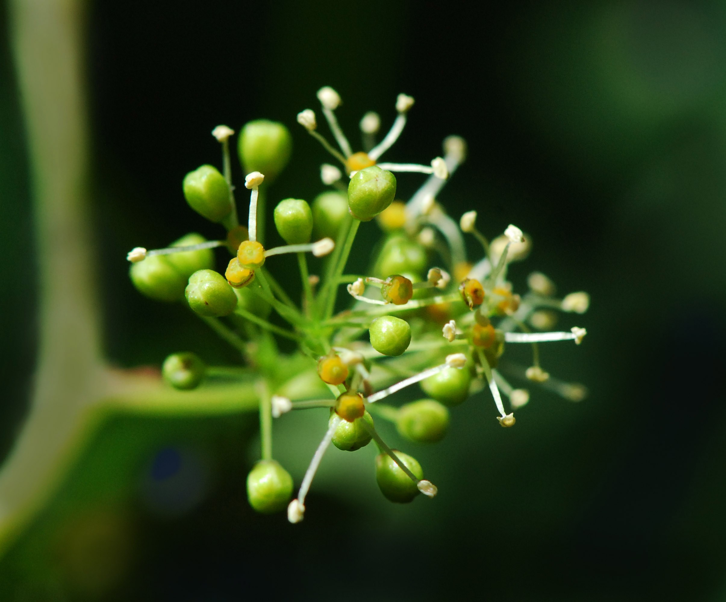 Vitis vinifera subsp sylvestris, fleur de lambrusque mâle